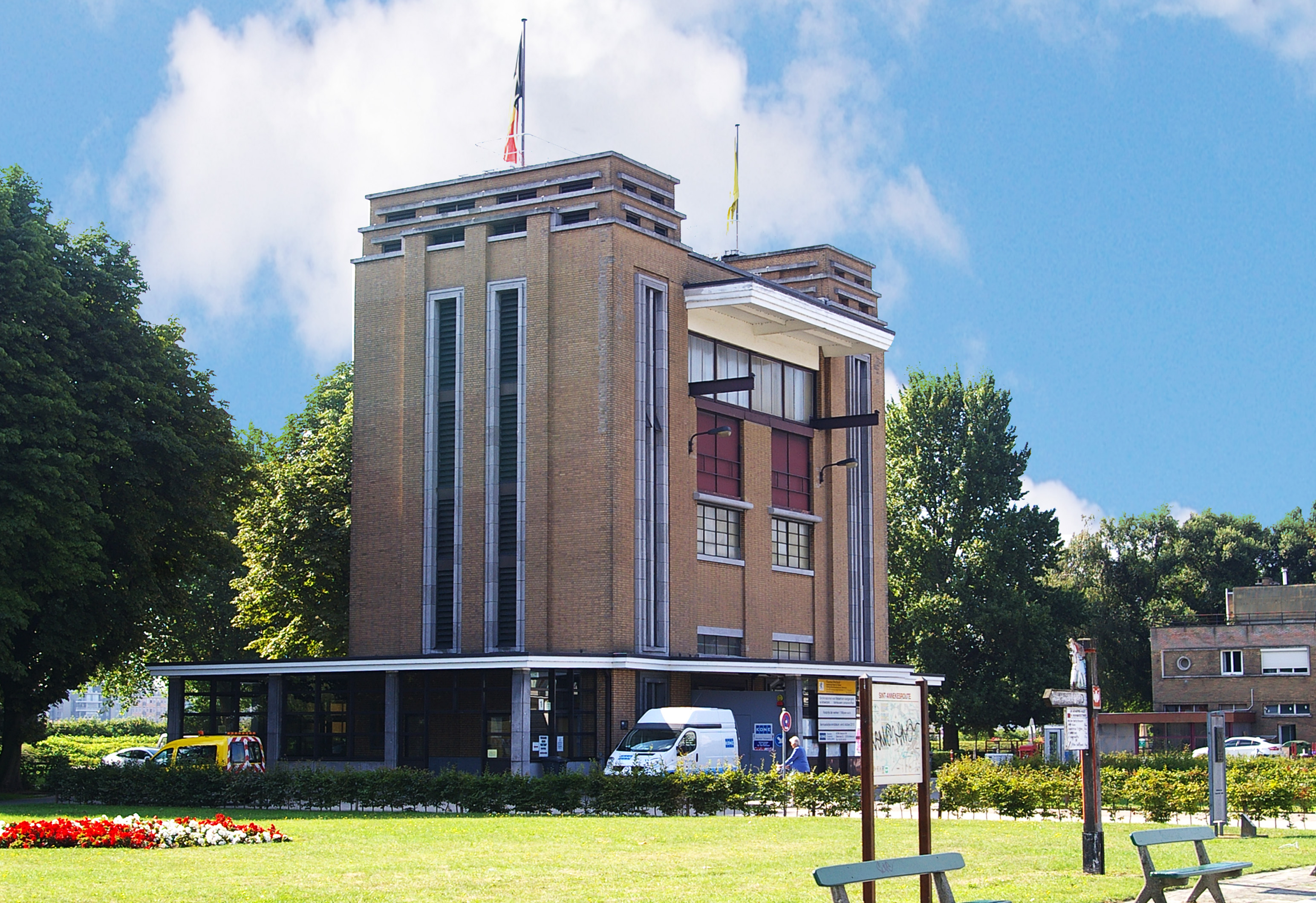 Eingang zum Sint-Annatunnel am linken Scheldeufer